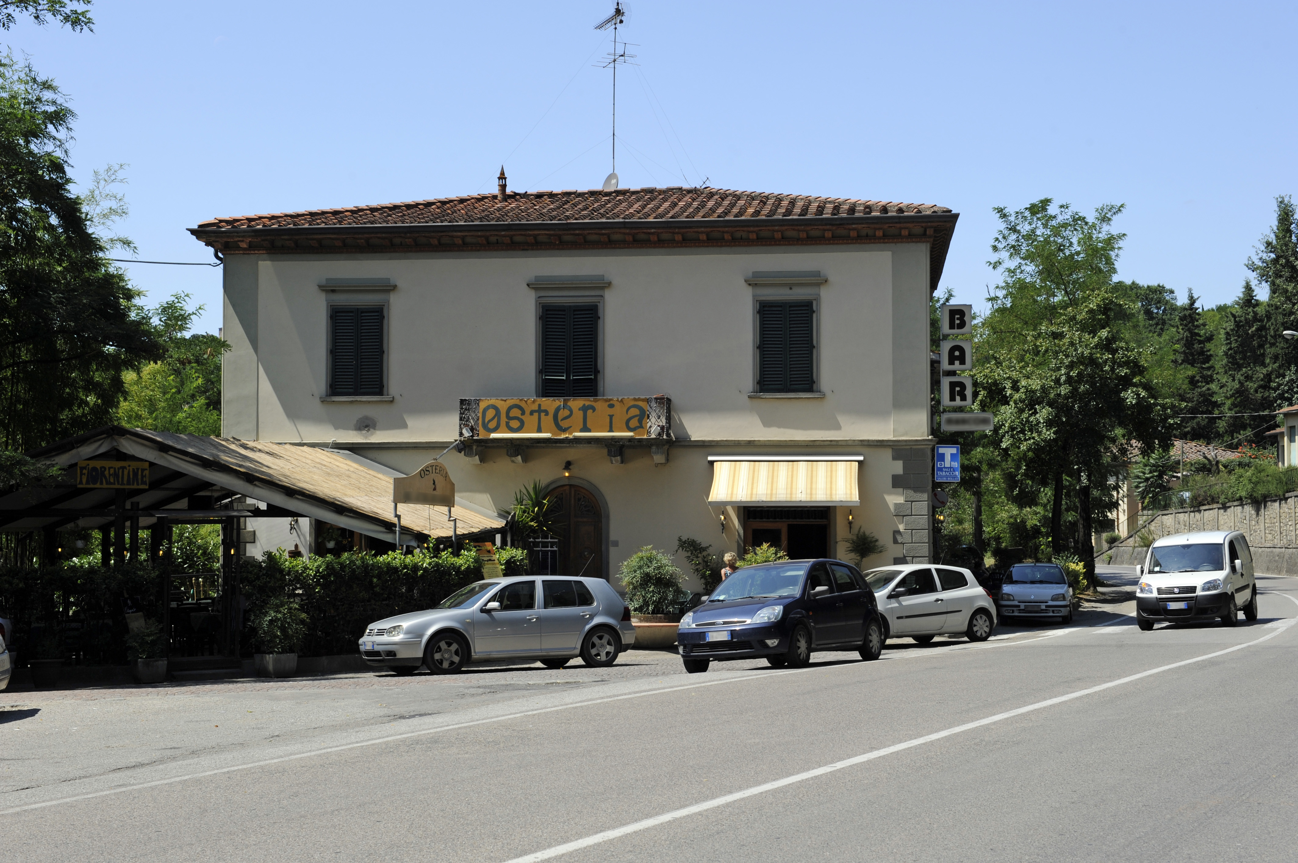 L'edificio che un tempo ospitava la stazione dei Falciani sulla linea della Tranvia del Chianti